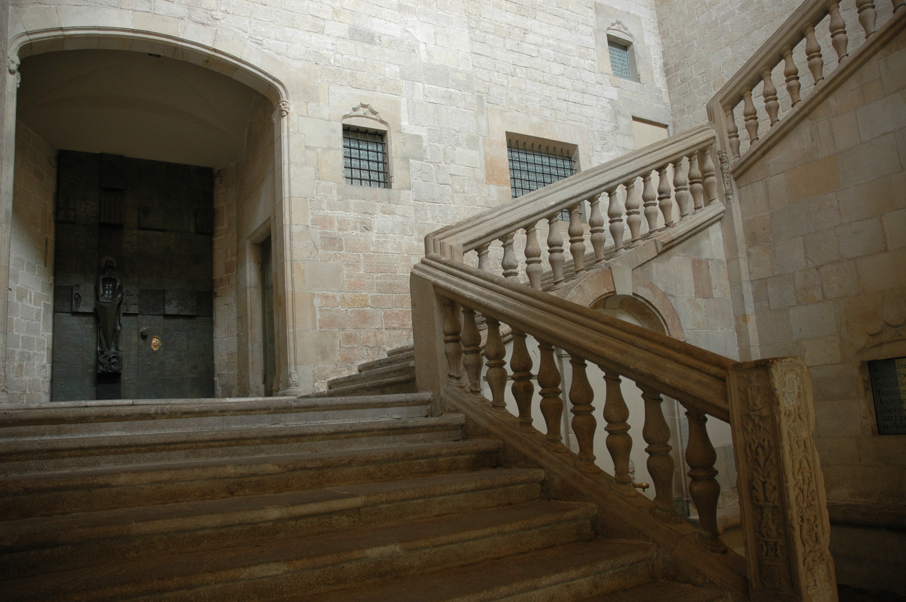 Palau del Lloctinent - Escala